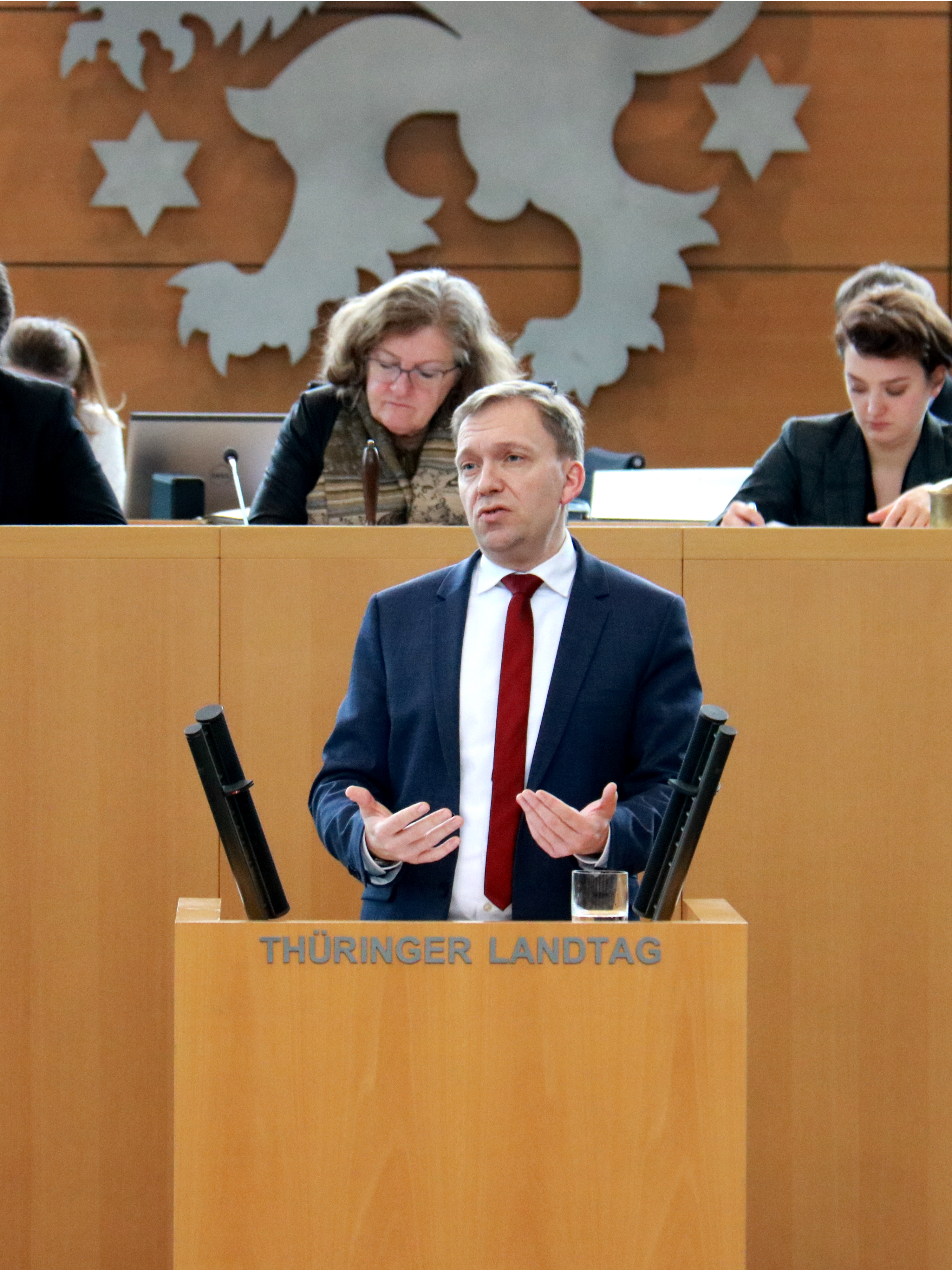 Matthias Hey bei einer Reden im Thüringer Landtag